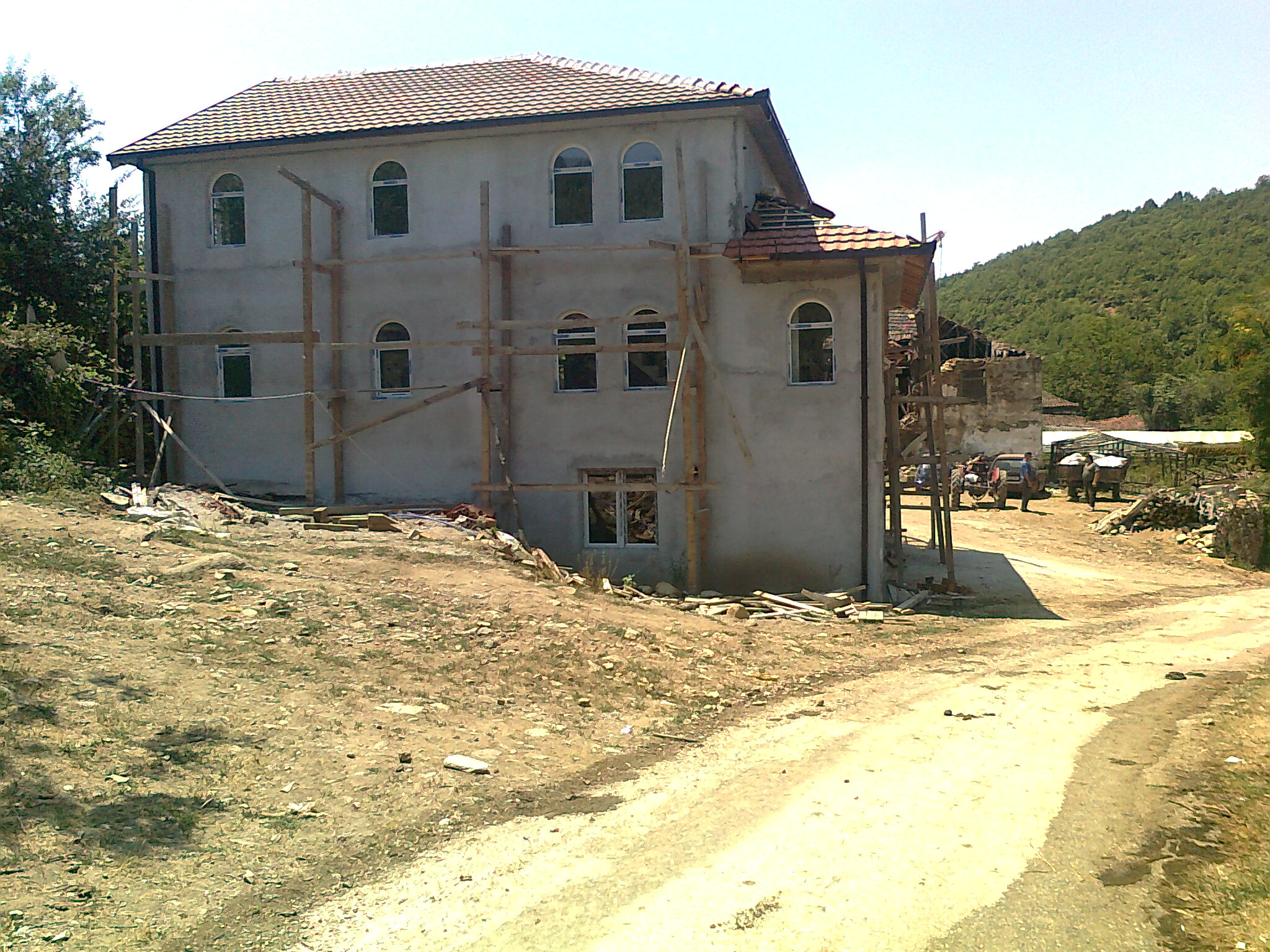 Mosque in Bašibos